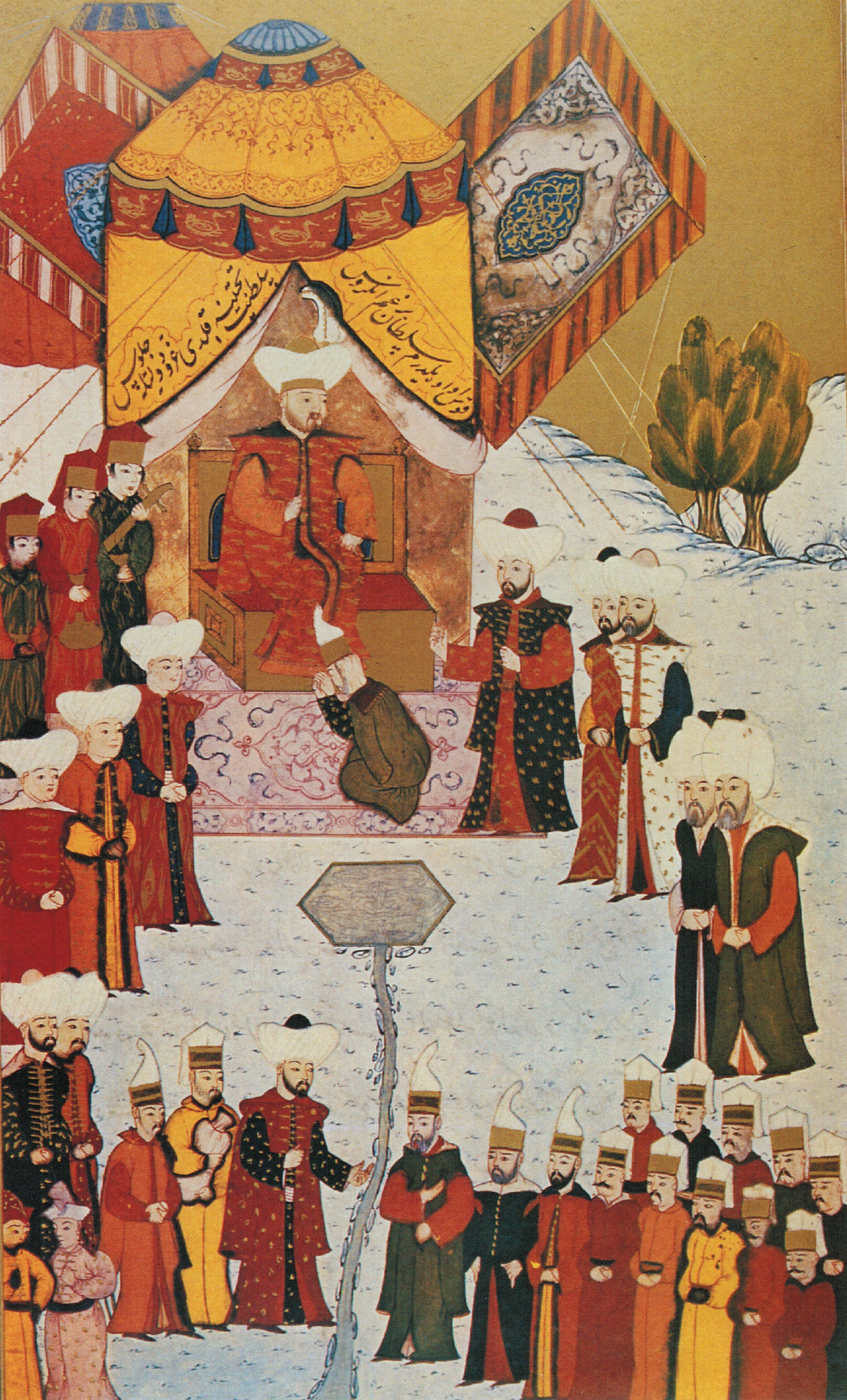 Bayezit proclamé sultan - miniature du XVe siècle